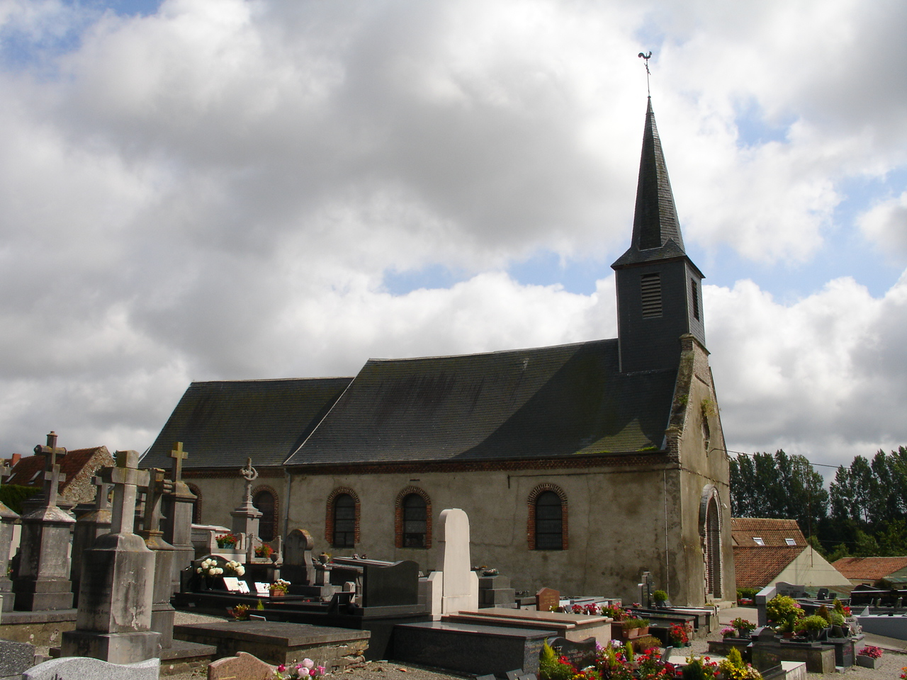 Église de Tubersent